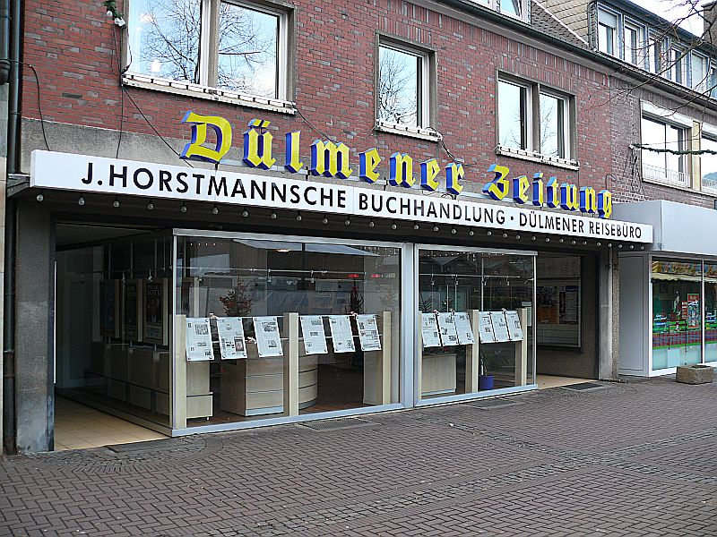 Geschäftsstelle der Dülmener Zeitung, eigenes Foto